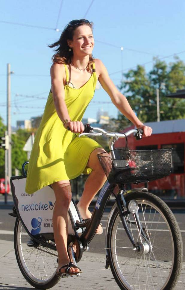 nextbike nutzer